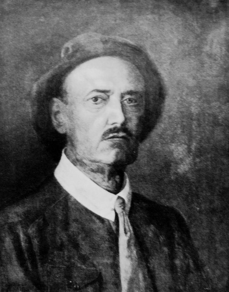 Self-portrait